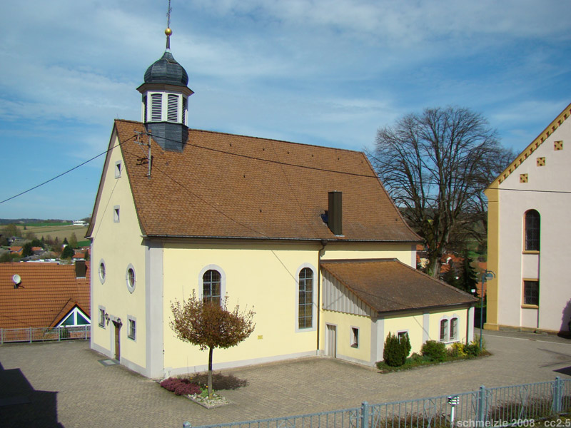 Kath. Kirche in Sinsheim-Reihen